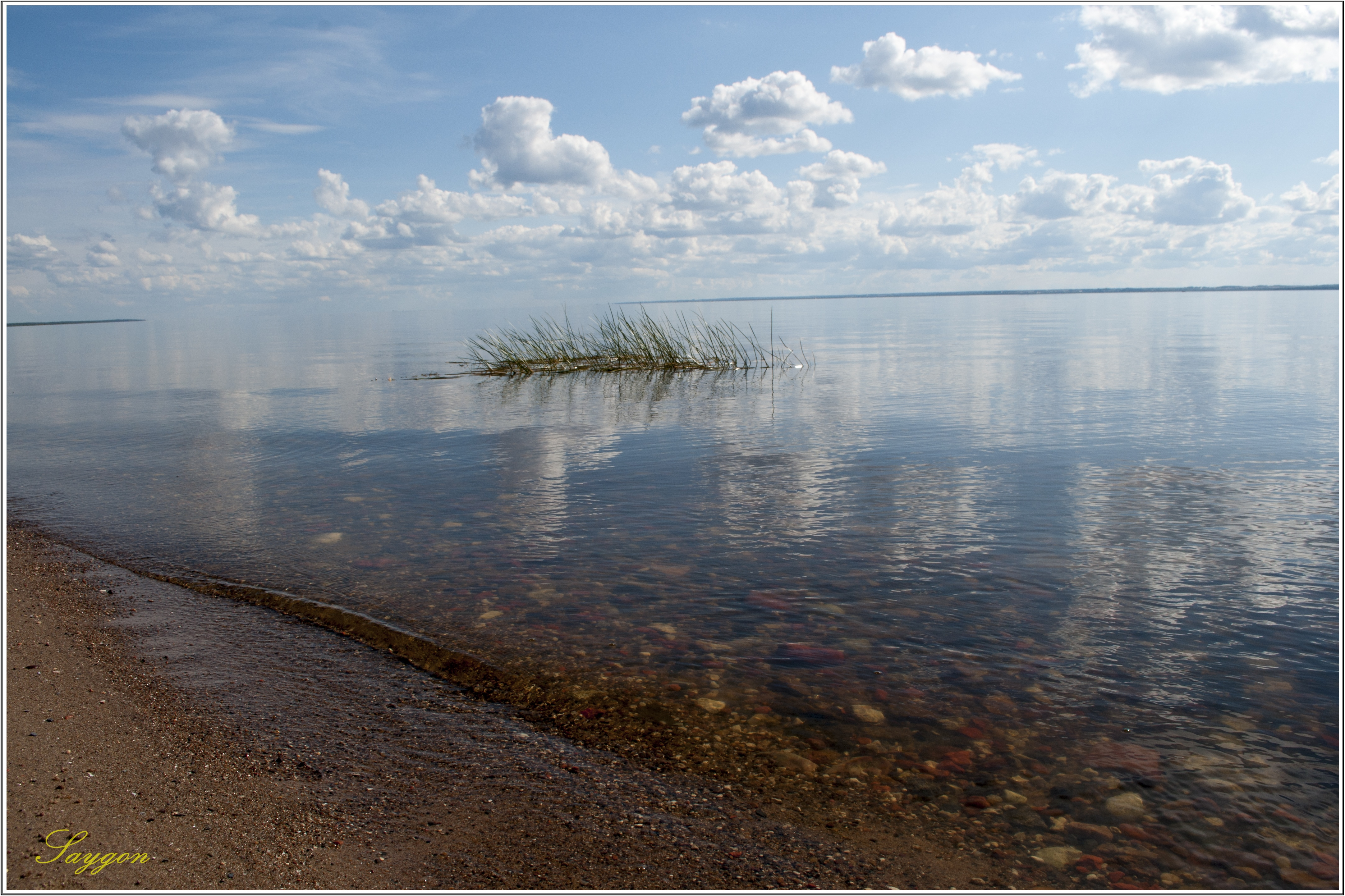 Монастырь Спас-Каменный (Вологодская область, Каменный остров на Кубенском озере).